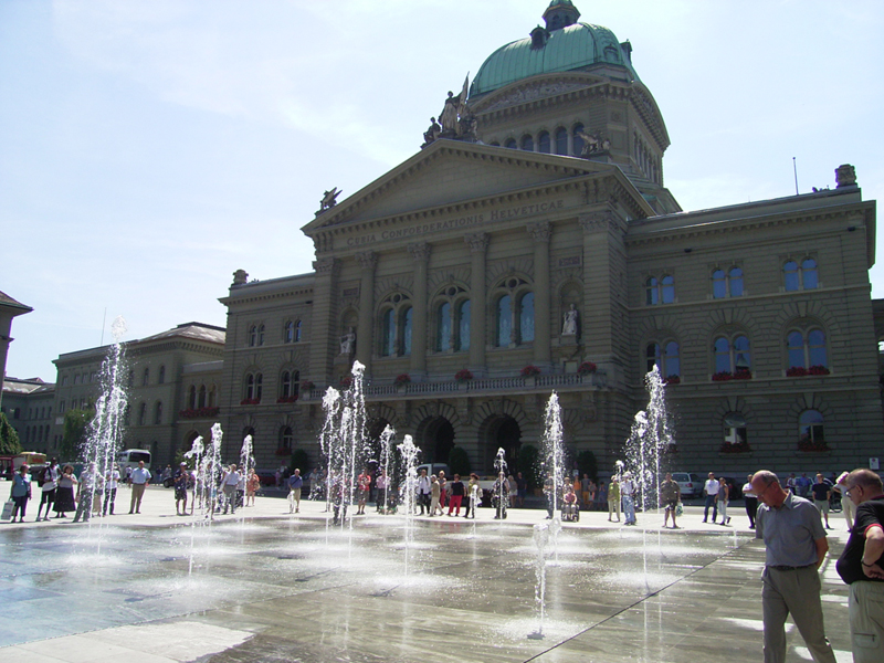 Bundesplatz